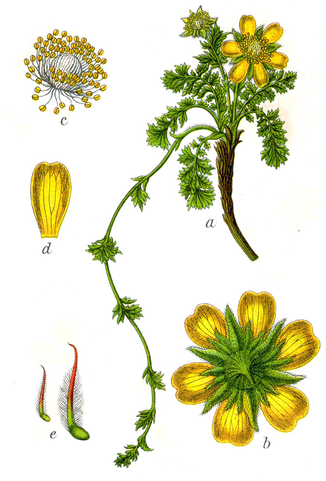 Geum reptans L. Original Caption Kriechende Nelkenwurz, Geum reptans